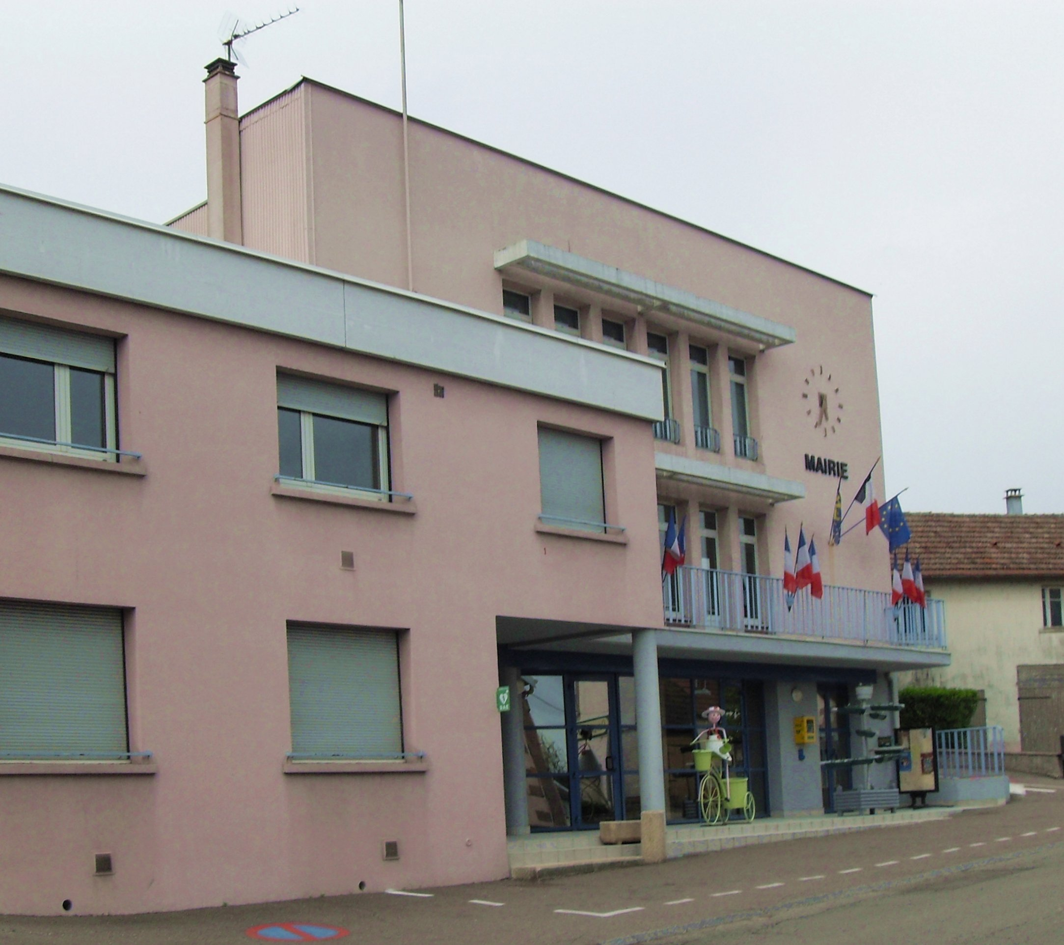 La mairie de Mélisey